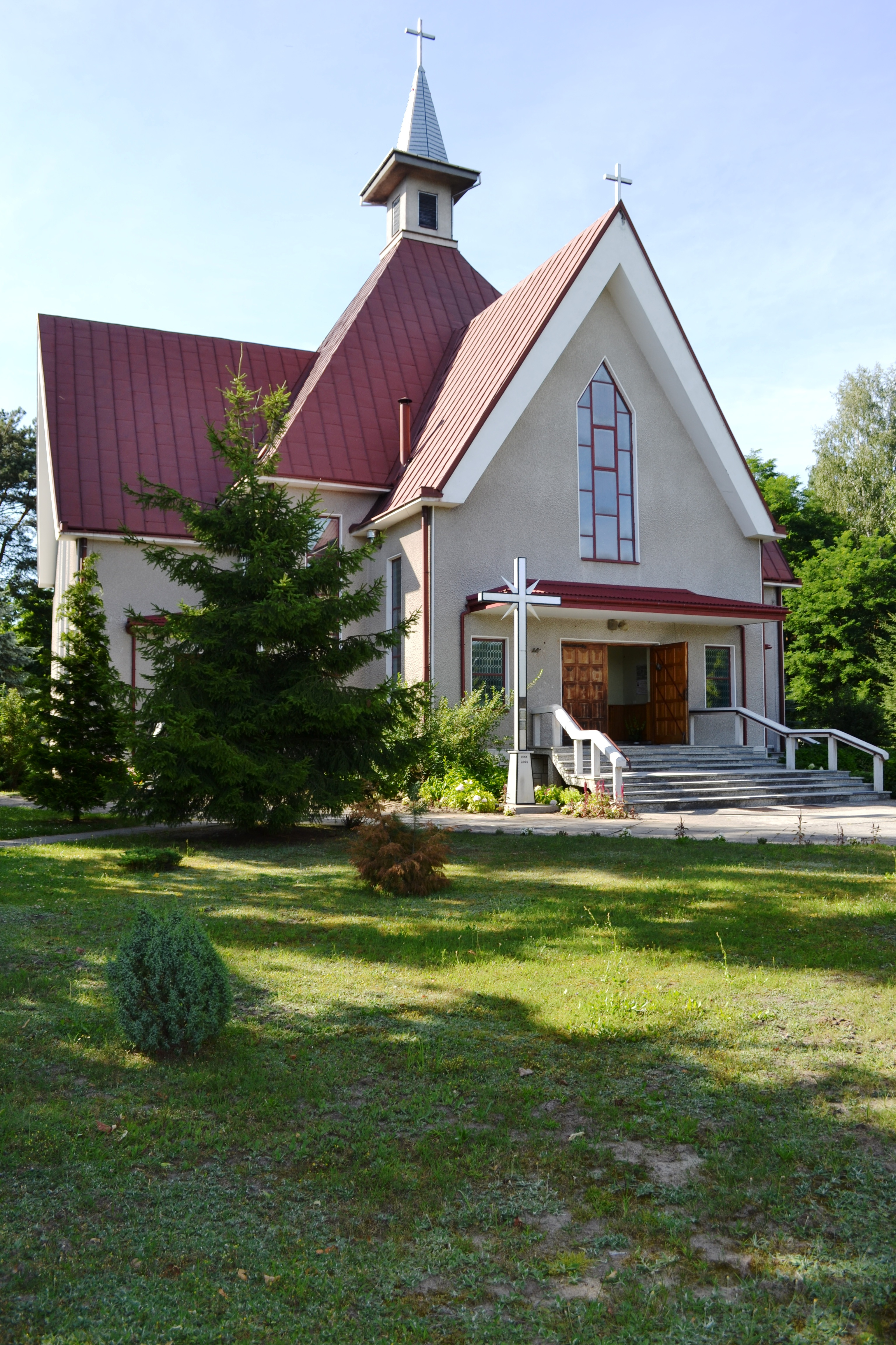 Kościół parafialny rzymskokatolicki w Borkach Nizińskich